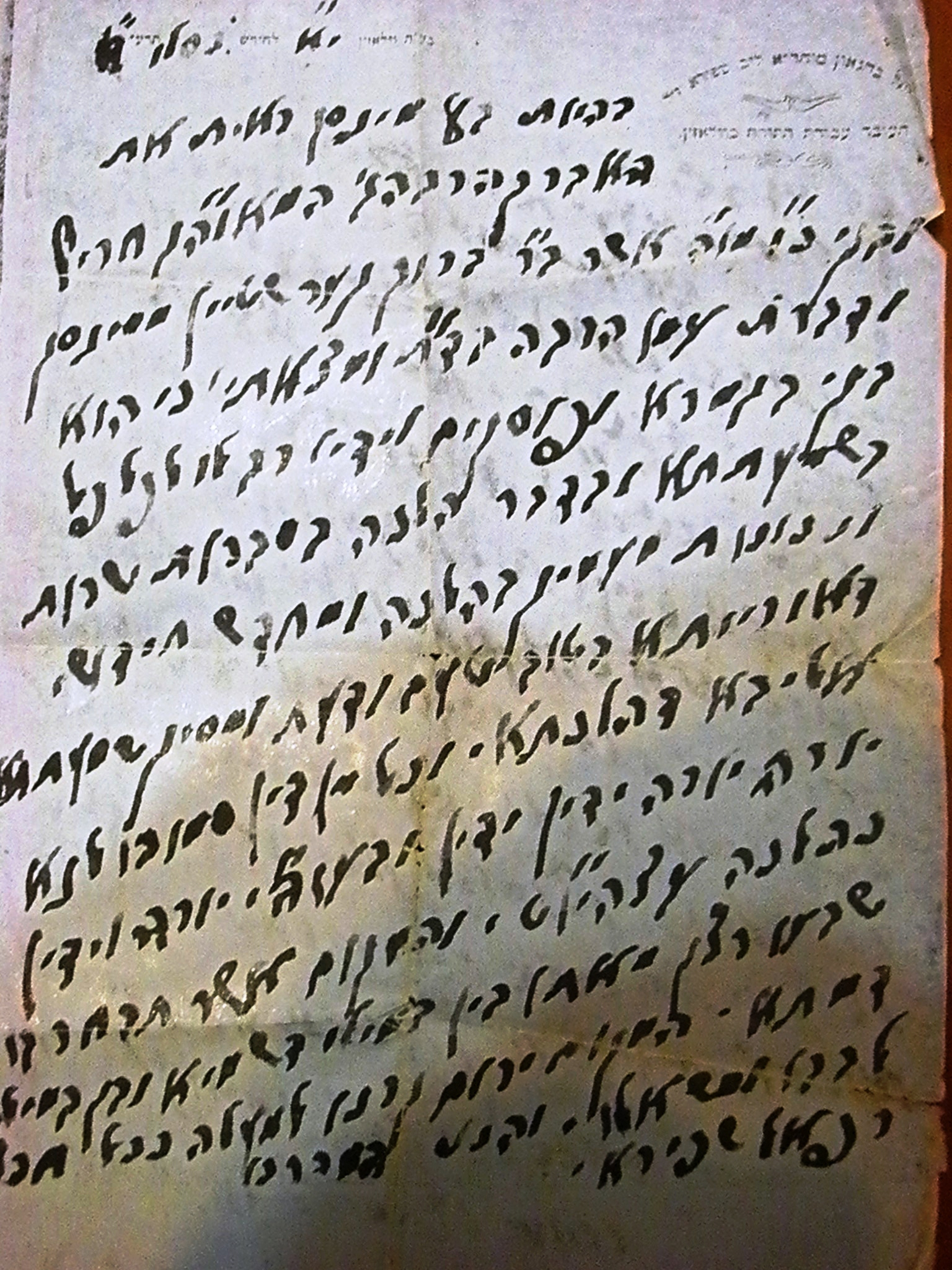 כתב סמיכה לרבנות שנתן הרב רפאל שפירא ראש ישיבת וולוז'ין לרב ברוך קרשטיין, מי שהיה הרב הראשי של עפולה במשך 40 שנה צולם מצילום הנמצא בידי בנו הבכור ישראל קרשטיין. המקור על קלף נמצא בידי הבן הצעיר החי בארה"ב המסמך נושא תאריך עברי הזהה ל- 26/11/1917